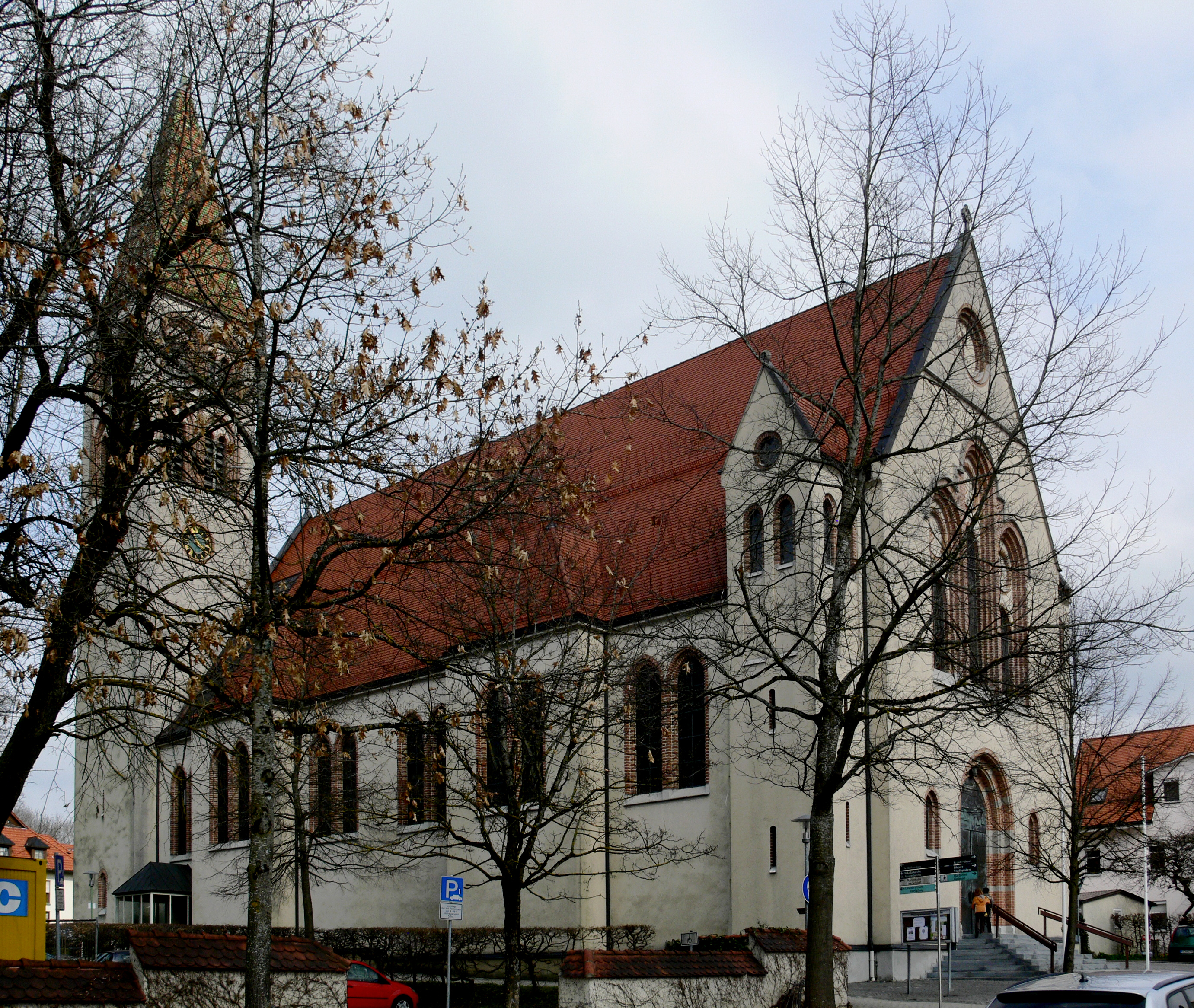 Isny im Allgäu, Katholische Pfarrkirche St. Maria